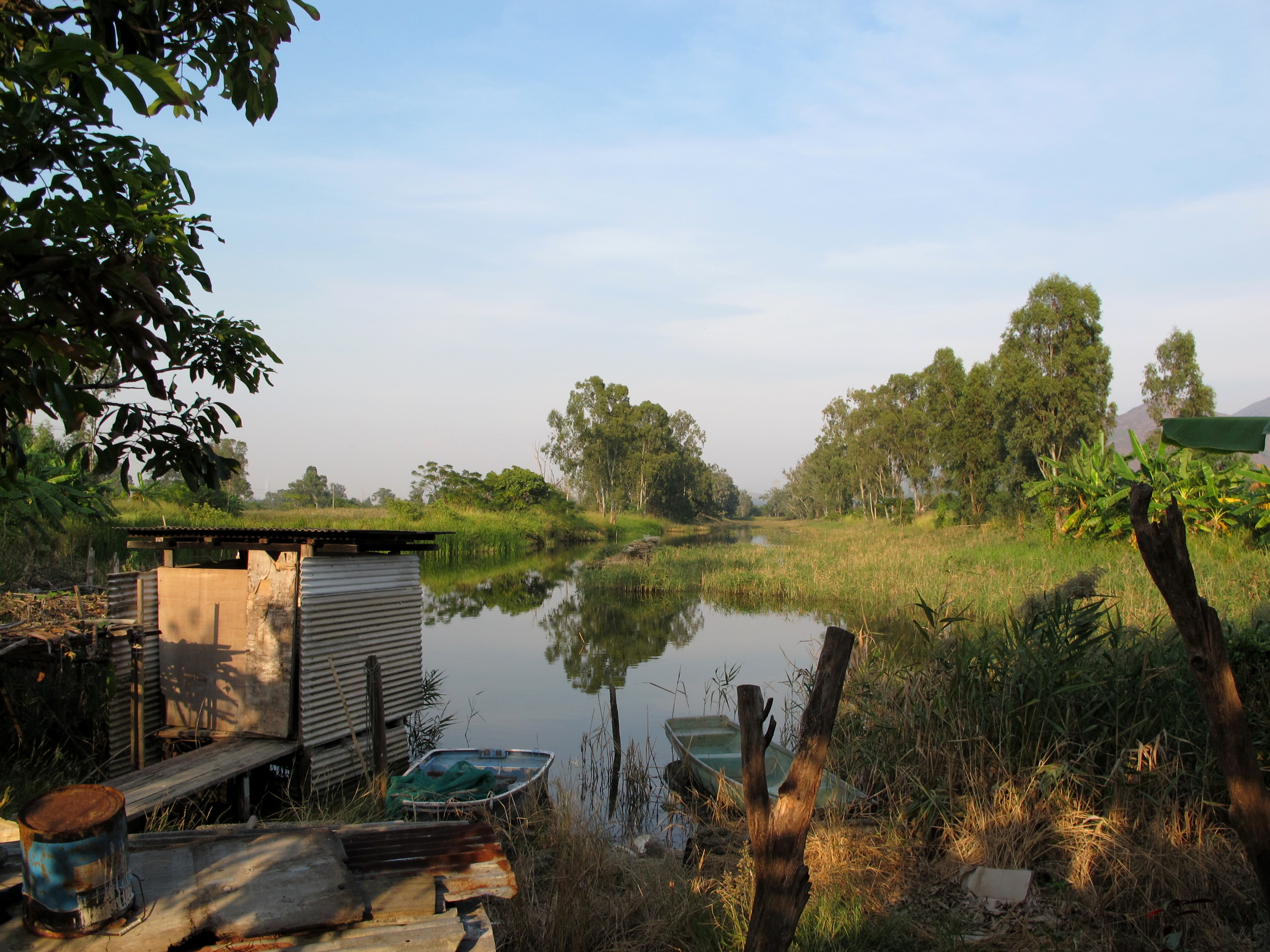 Nam Sang Wai